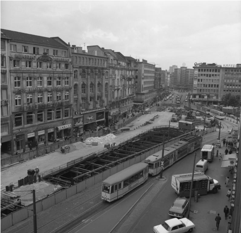 Frankfurt am MainRoßmarkt, mit Blick Richtung Kaiserstraße U-Bahn-Bau